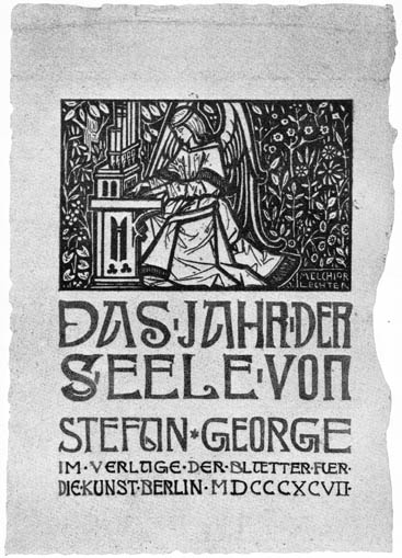 Titelblad för Das Jahr der Seele (1897), diktsamling. Författare Stefan George.